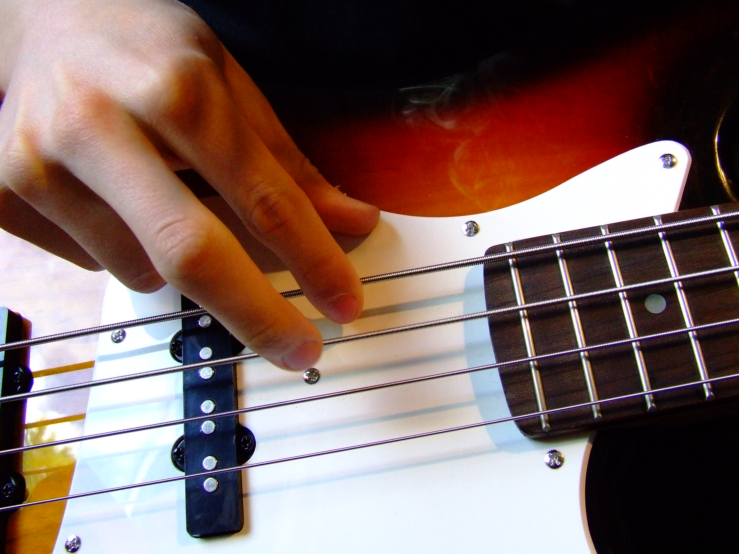 Finger-Picking-Technik beim E-Bass